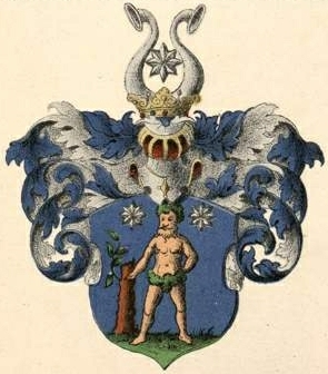 Wilckeni (Bebri) suguvõsa aadlivapp